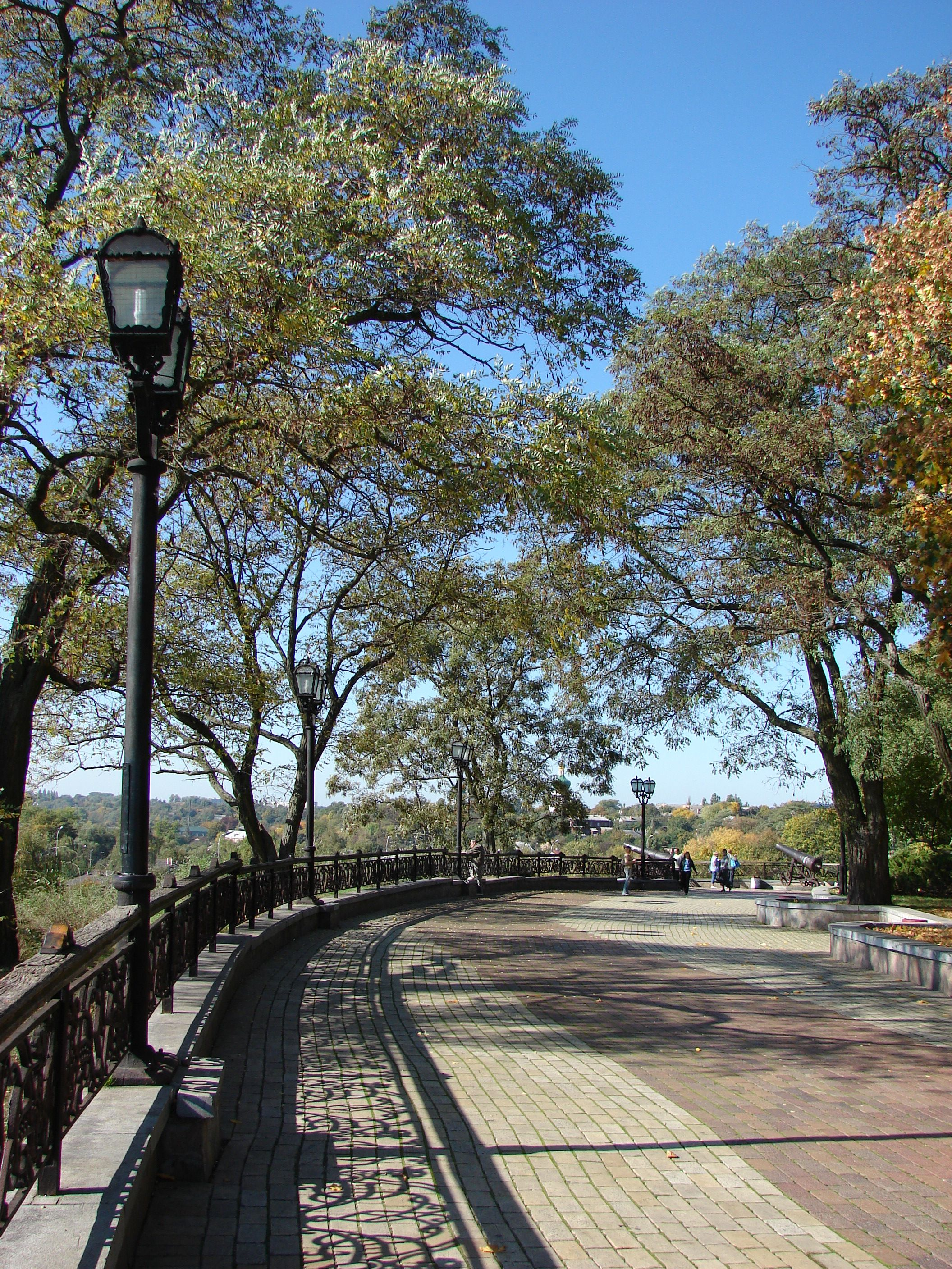 Чернігів.Вал.